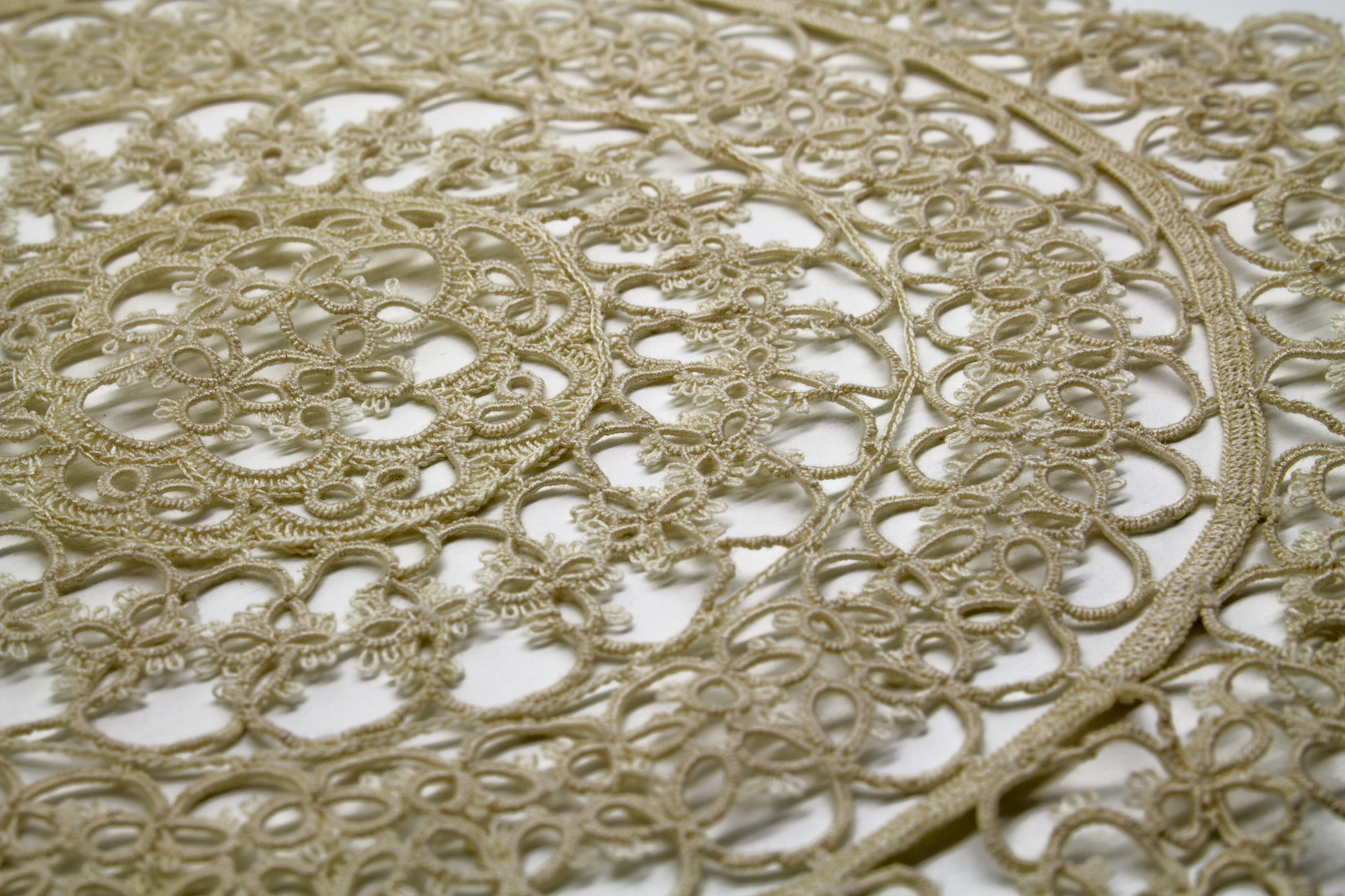 Exemplo de frivolité